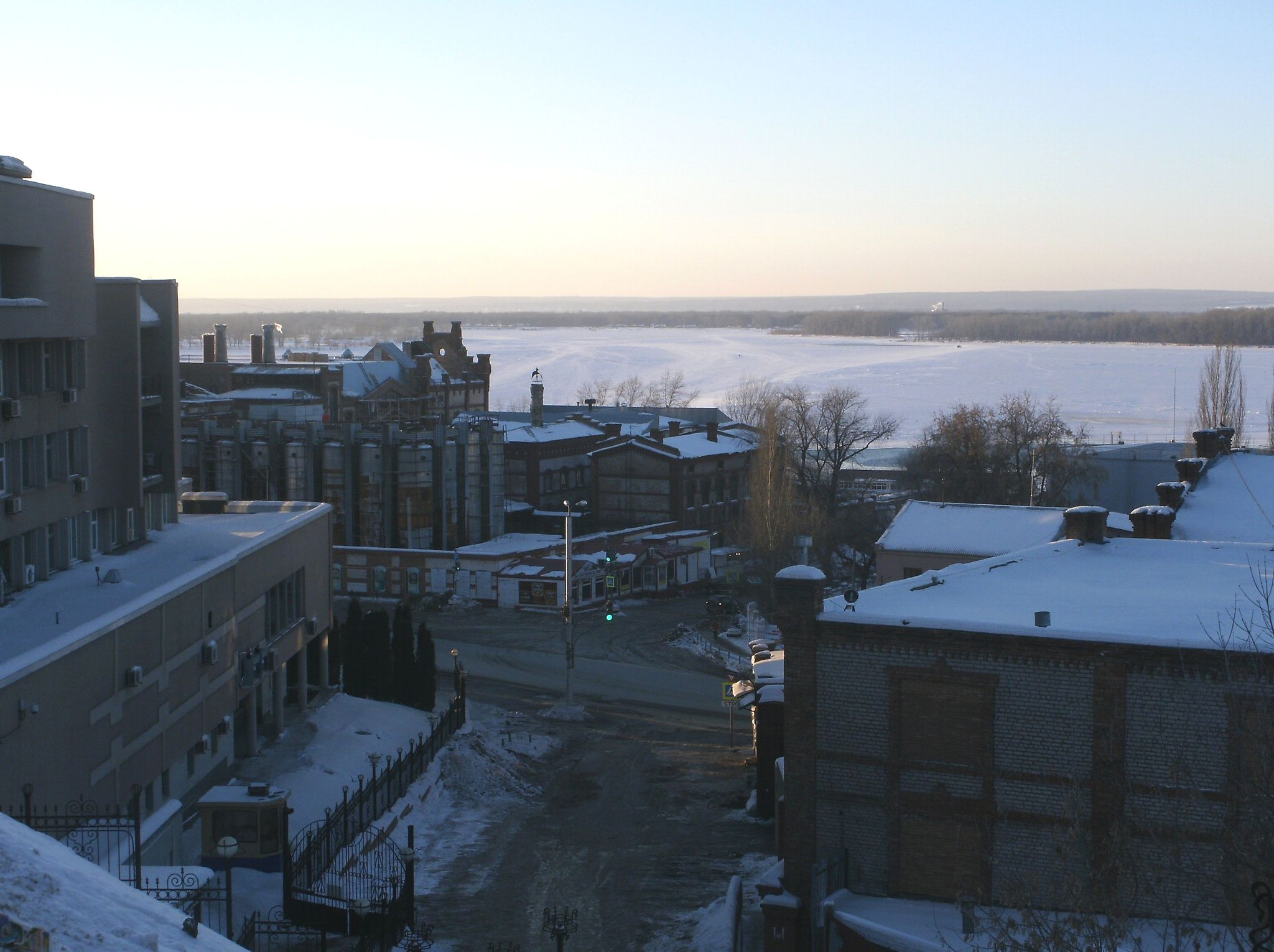 Самара.Пересечение Чапаевская и Ульяновская, вид на р.Волгу и Пивзавод